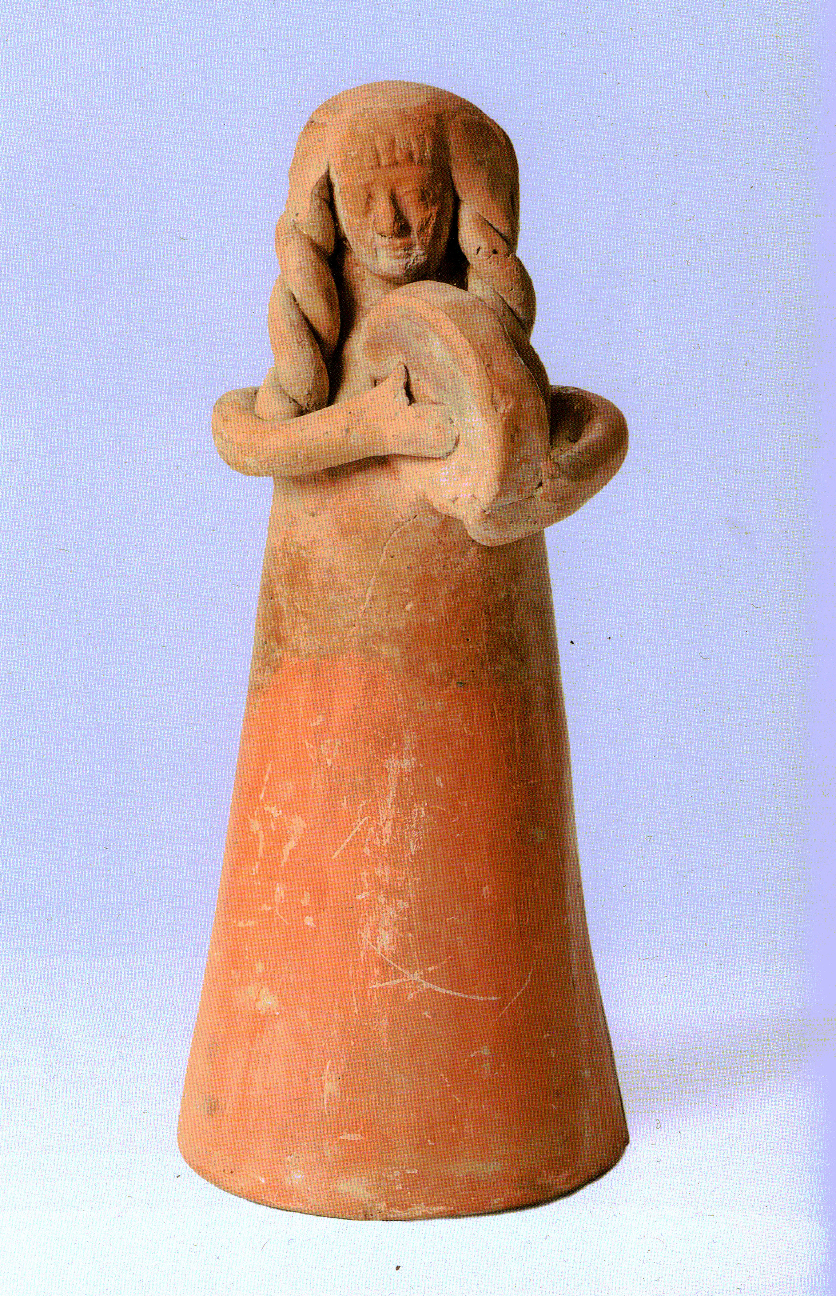 Terracotta figurines in Ancient time - Israeli National Maritime Museum. Haifa צלמיות בעת העתיקה, מאוסף המוזיאון הלאומי הימי בחיפה צלמית היא פסלון קטן ממדים בצלם אדם או בעל חיים. הצלמית יוצרה מחומרים שונים בעיקר טין, אבן ומתכת. על פי הצלמית ניתן ללמוד על מנהגי פולחן , אורחות חיים ומנהגים של התרבויות השונות לאורך ההיסטוריה. מקום הימצאן הפיזי כפי שהן נמצאות בעת חפירה ארכאולוגית מאפשר הסקת מסקנות לגבי השימושים של הצלמיות כגון, חפצי קדושה, קמע פוריות, קמע מזל ועוד. הצלמיות הקדומות ביותר במזרח הקרוב הופיעו בתקופה הניאוליתית קדם-קראמית (מחצית האלף ה-9 לפנה"ס – ועד סוף האלף ה-6 לפנה"ס) צלמית חרס, מנגנת בטמבורין . כלי נגינה זה היה נפוץ בקרב הנשים ושימש לליווי שירה וריקודים. תקופת הברזל ב2 המאה השמינית לפנה"ס. משקמונה This image was taken as part of the Wikipedia Loves Art project and is uploaded curtesy of the National Maritime Museum in Haifa. In any use of this image credit need be given to the Museum as well as the photographer. The copyright holder of this file allows anyone to use it for any purpose, provided that the copyright holder is properly attributed. Redistribution, derivative work, commercial use, and all other use is permitted. This image was taken as part of the Elef Millim project trip and within the Wikipedia Loves Art project to the National Maritime Museum in Haifa in the northern part of Israel, which was held on Friday, 22nd January 2010. To view all images uploaded as pary of the Elef Millim Project